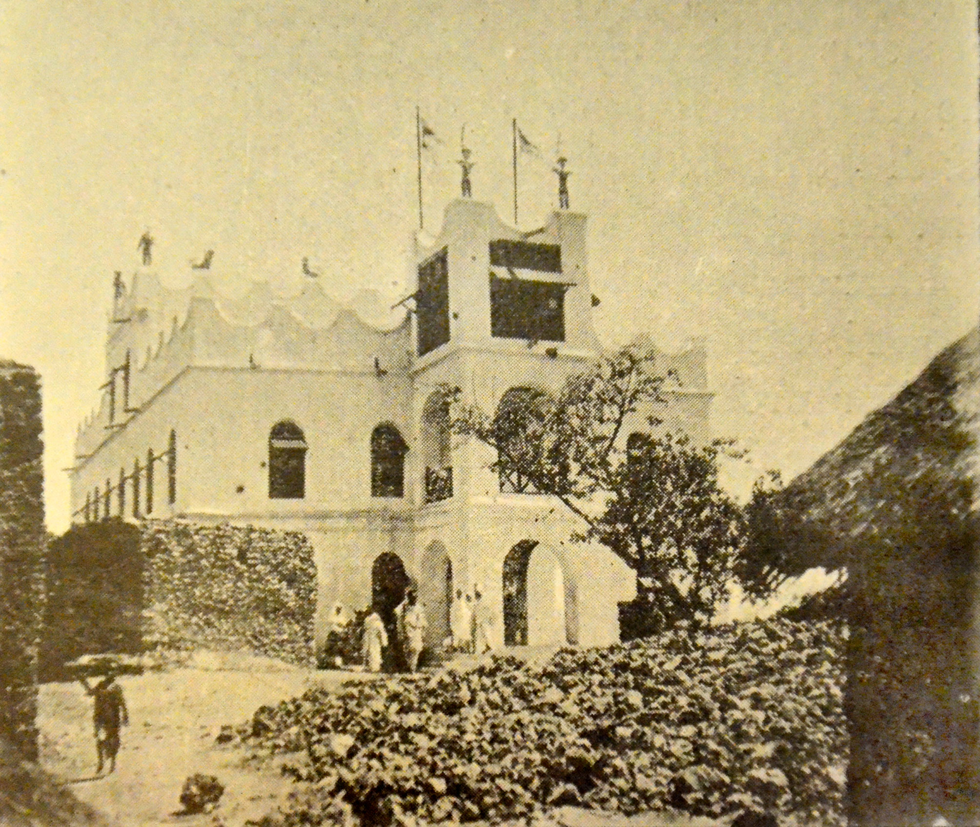 Photo ancienne, légendée "Palais du ras Makonnen, principal chef de l'armée abyssine", dans un article du journal "la Revue illustrée" (Tome relié 1902) consacré à l'Abyssinie.